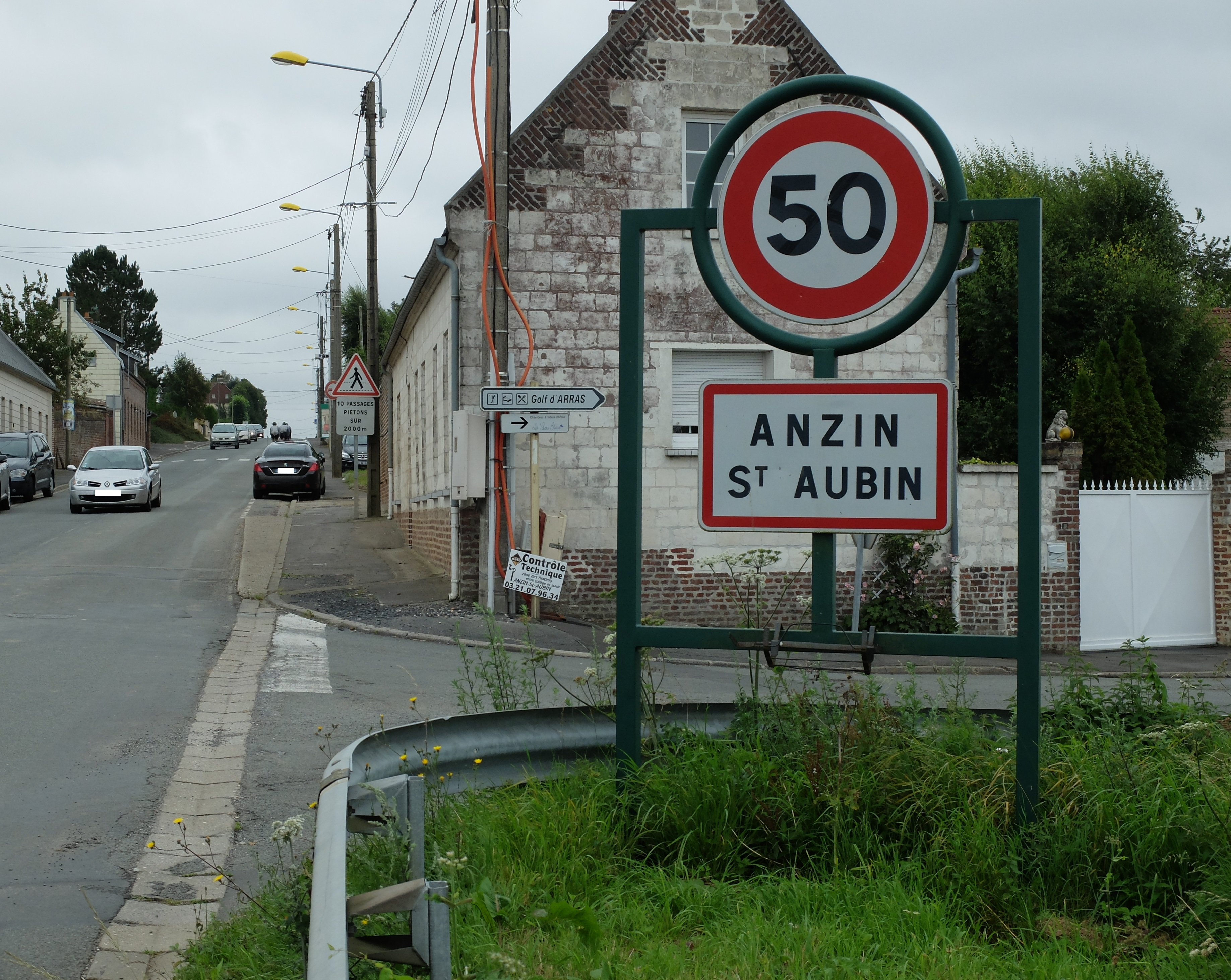 Vue d'une entrée d'Anzin-Saint-Aubin.